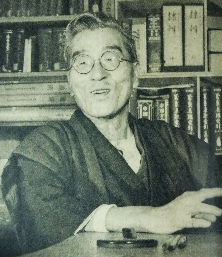 会津八一